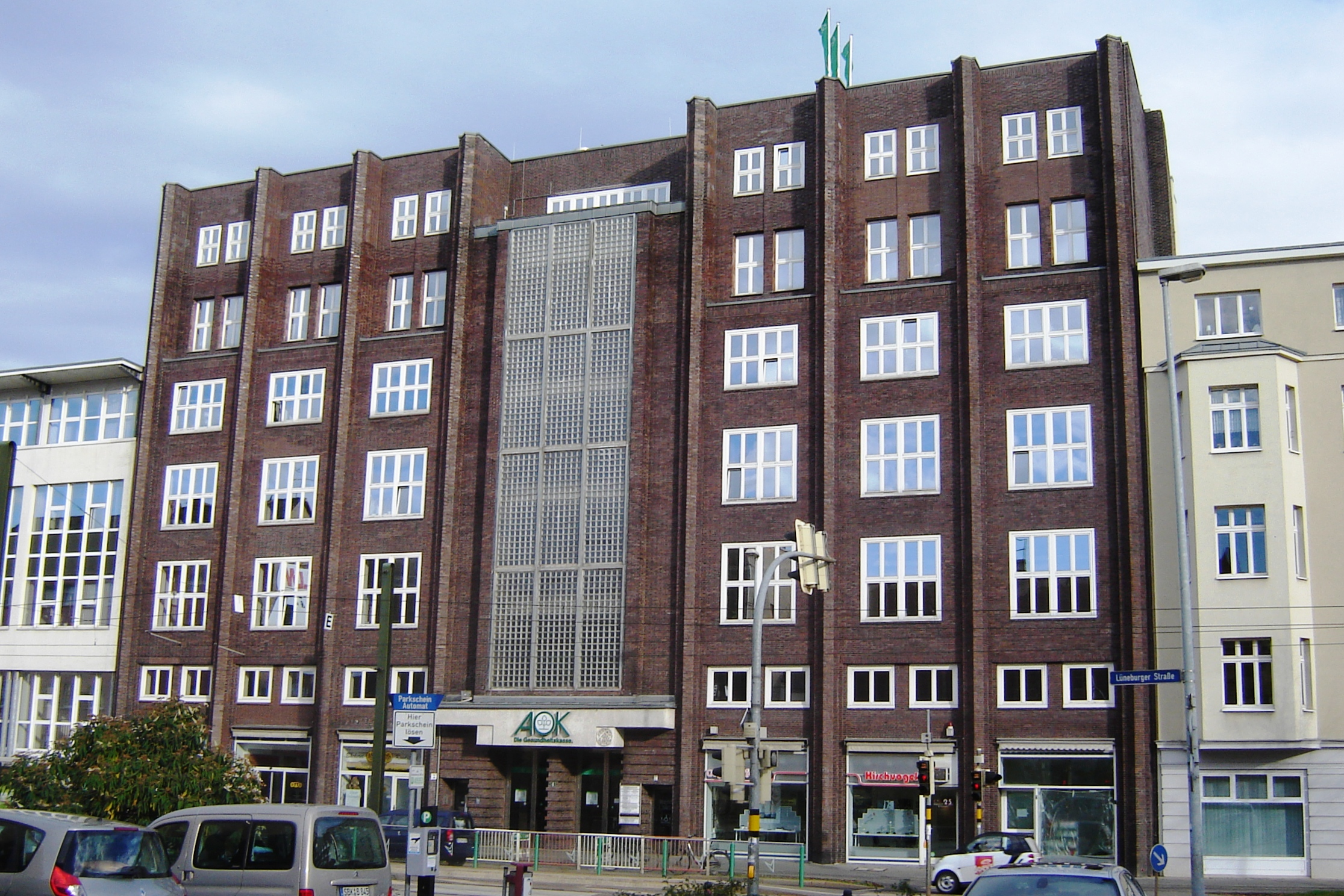 Magdeburg, Lüneburger Str. 4, AOK-Gebäude (Kulturdenkmal)